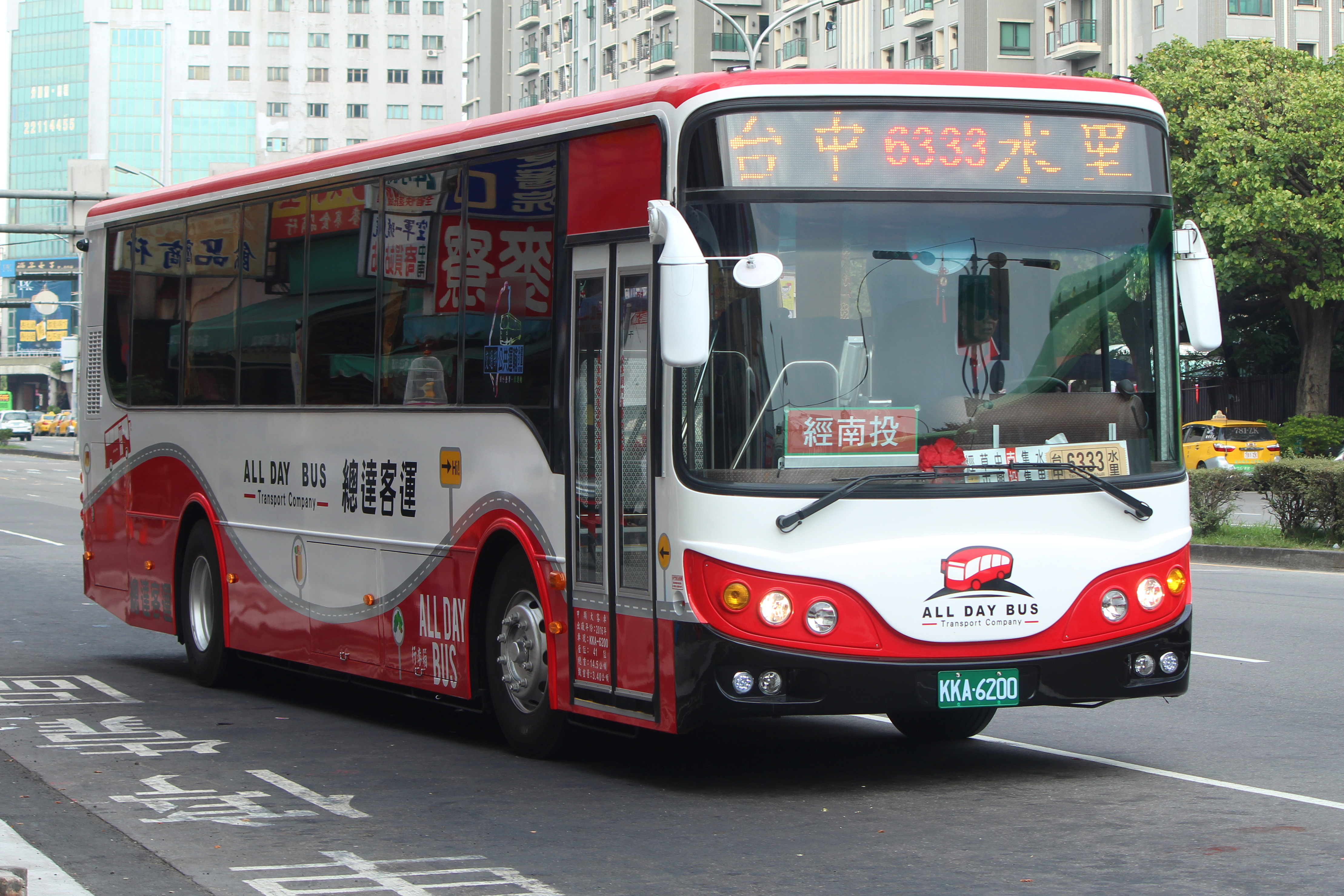 6333 干城待發